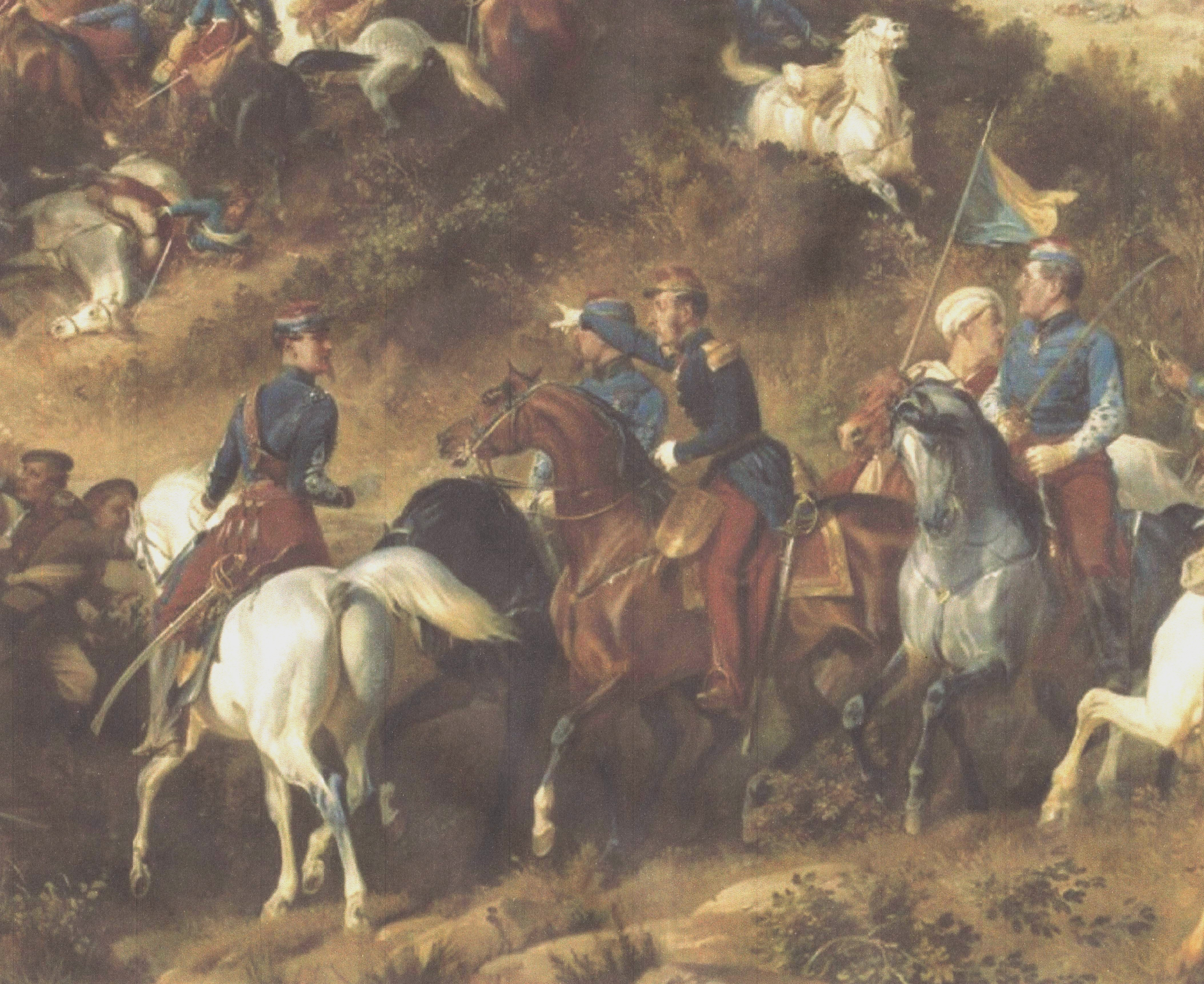 Général d'Allonville donnant des ordres à son aide de camp, Ernest de Rambaud à la bataille de Balaklava